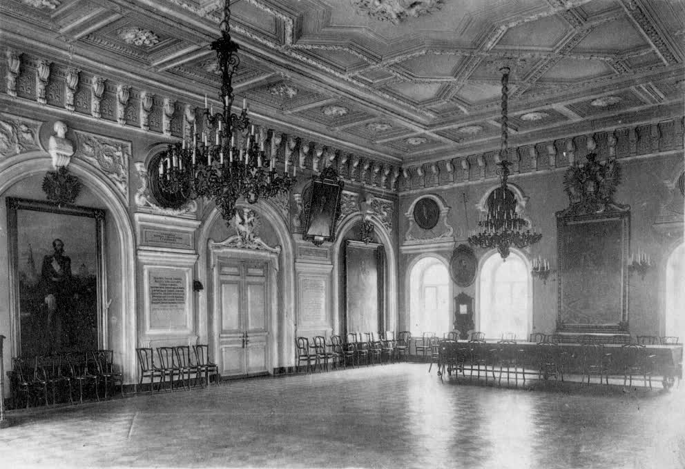 Парадный зал КТУ 1878 г